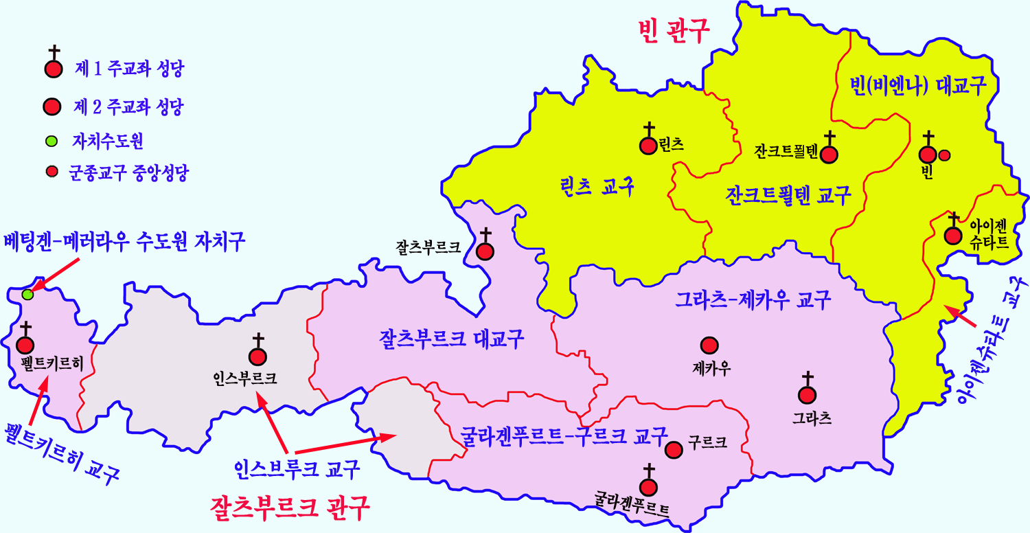 오스트리아 가톨릭교구도